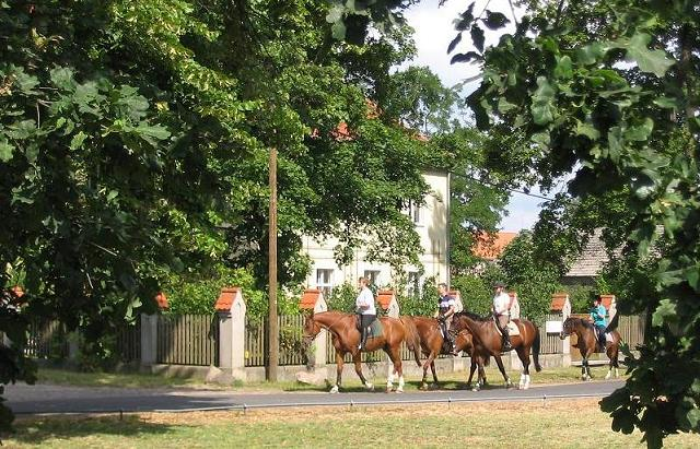 Reiter in Gröben, Brandenburg